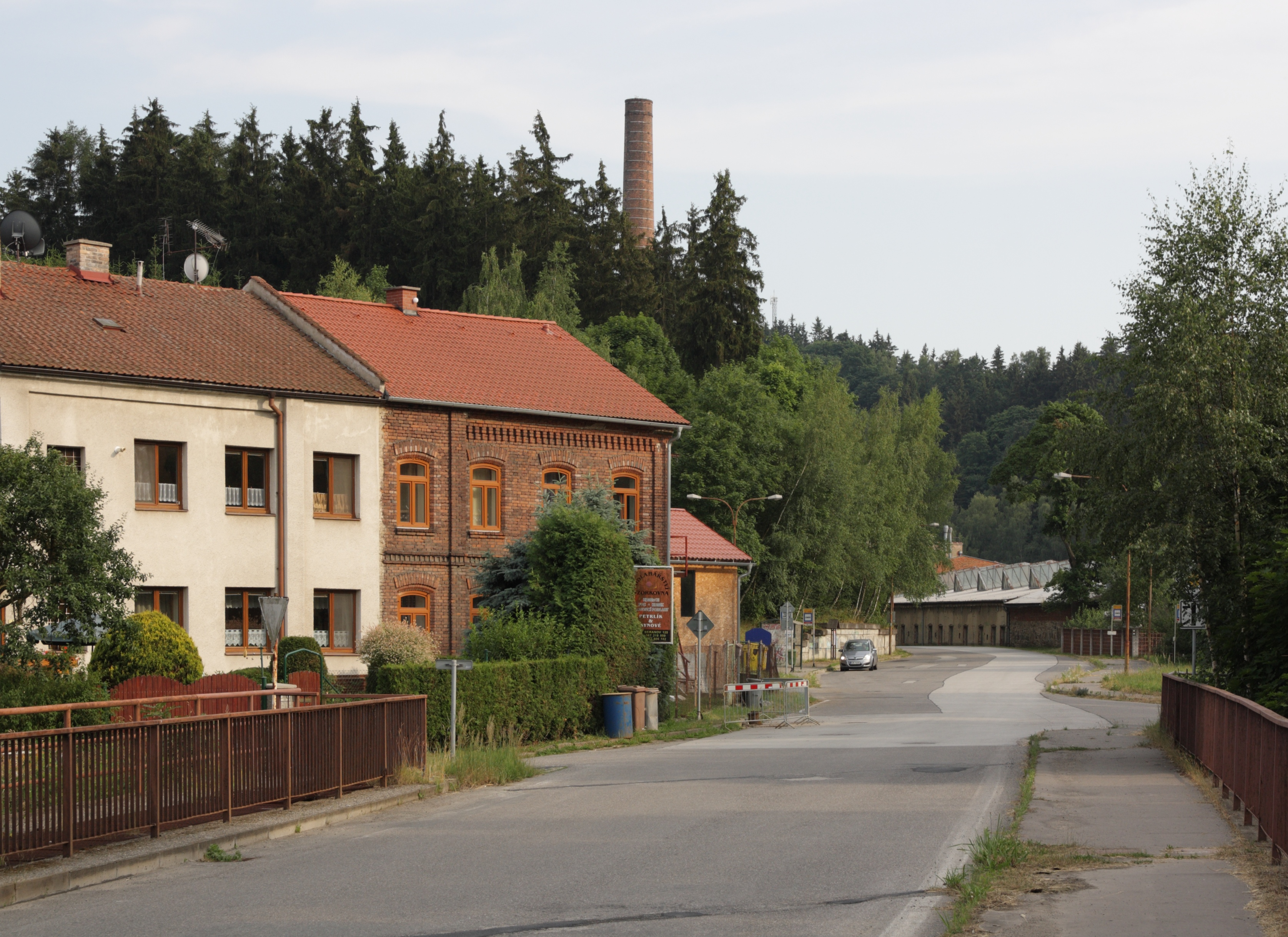 Malý Beranov - příjezd od severu, v popředí most přes Jihlavu.